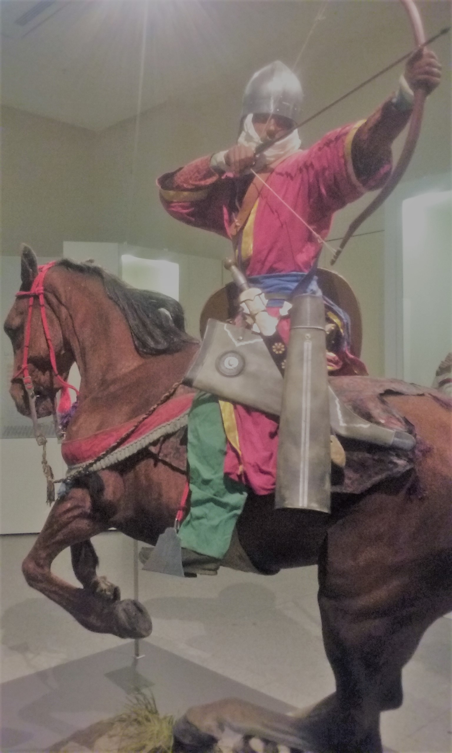 Archer à cheval nasride (vers 1493). Musée de l'armée - Museo del Ejercito, Tolède.